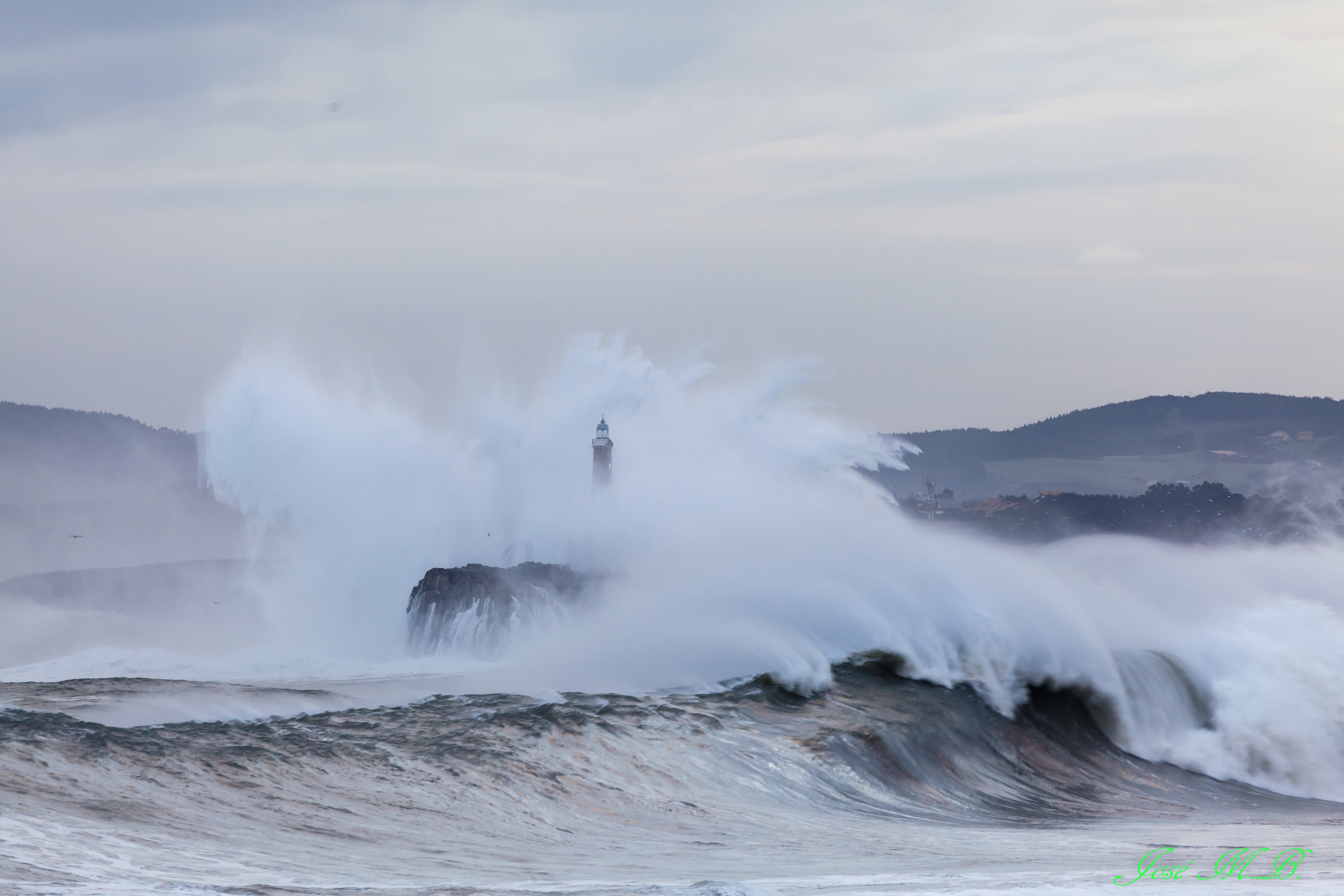 Temporal en el Sardinero, faro de la isla de Mouro